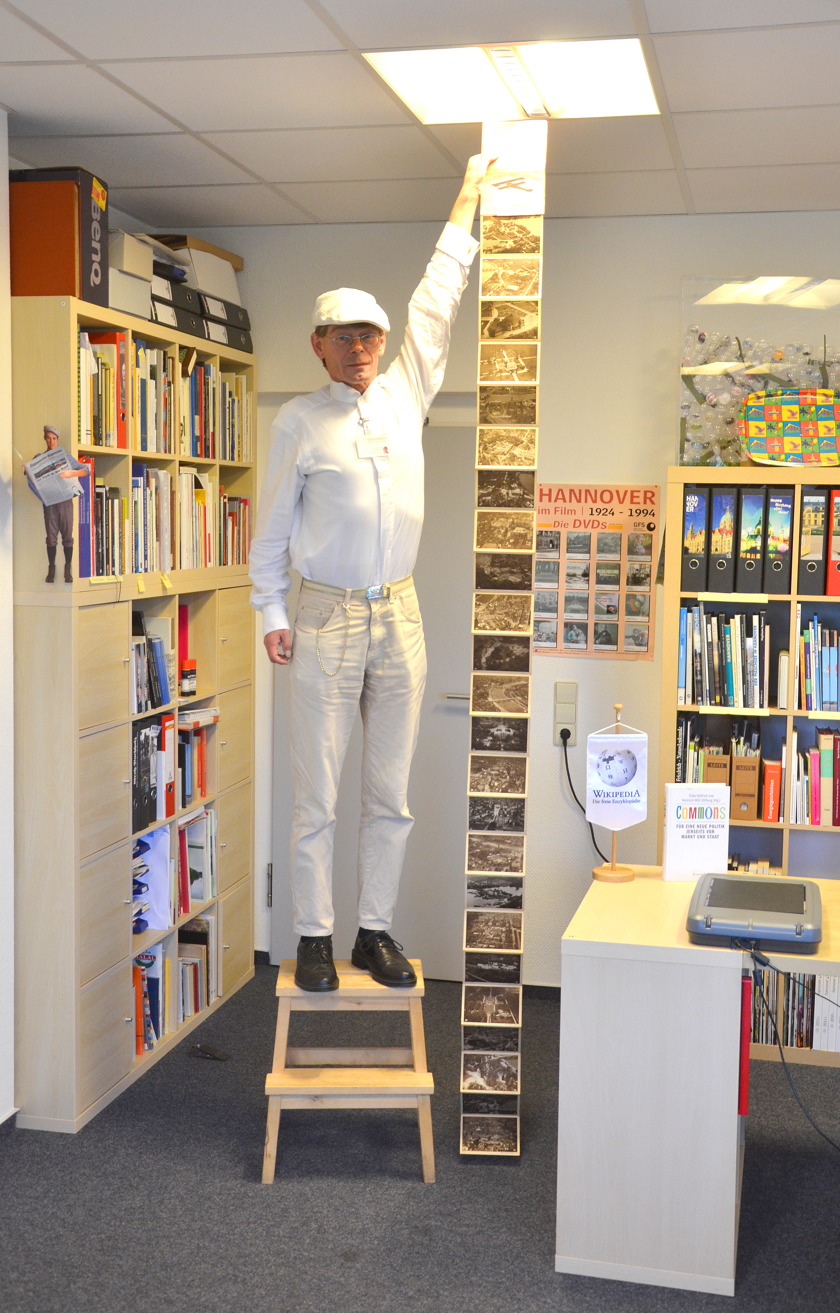 Initiiert und fotografiert vom Team im Wikipedia-Büro Hannover als Aufgabe von nationaler Rang: Claus-Peter Enders fotografierte hier Bernd Schwabe mit bis zur Decke hochgestrecktem Arm, in der linken Hand das Leporello mit dem Titel „Im Fluge über Dresden / 24 Aufnahmen der Deutschen Luft-Reederei / vom Flugzeug aus gesehen. Serie 40.“ Die 24 Ansichtskarten, auf der Adressseite (Revers) durchweg mit dem Zudruck „ - Fliegeraufnahme der D. L. R. - / aus 200 m Höhe“ In dem zum Aufkleben der Briefmarke vorgesehen Feld ist zudem vermerkt: „Als Postkarte nur in Deutschland zulässig“ Hinter der Angabe „Verlag: Albert Rehfeld, Dresden 9“ gefolgt von der von Rehfeld fortlaufenden Nummerierung von No. 1 bis No. 24. Diese Nummerierung entsprach nicht den auf der Bildseite von der DLR vorgegebenen fortlaufenden Nummerierung der Ansichtskarten, die in diesem Leporello unchronologisch von den Nummern 194 bis 321 reichen ...